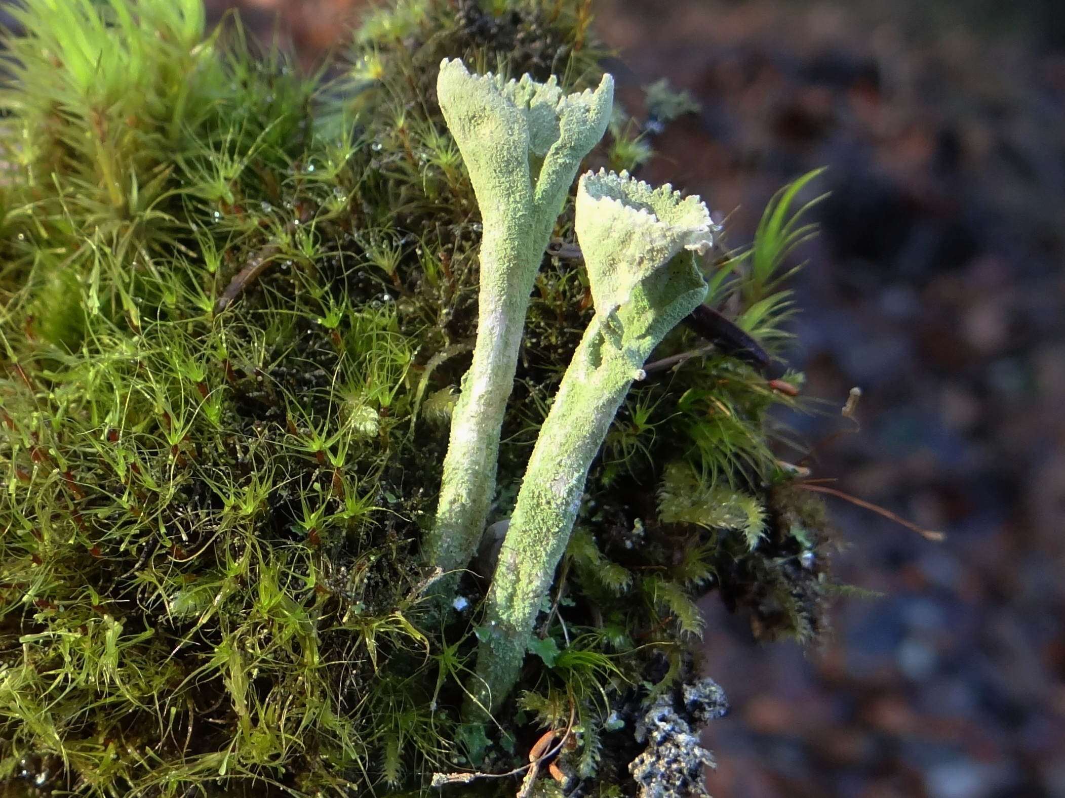 Cladonia fimbriata